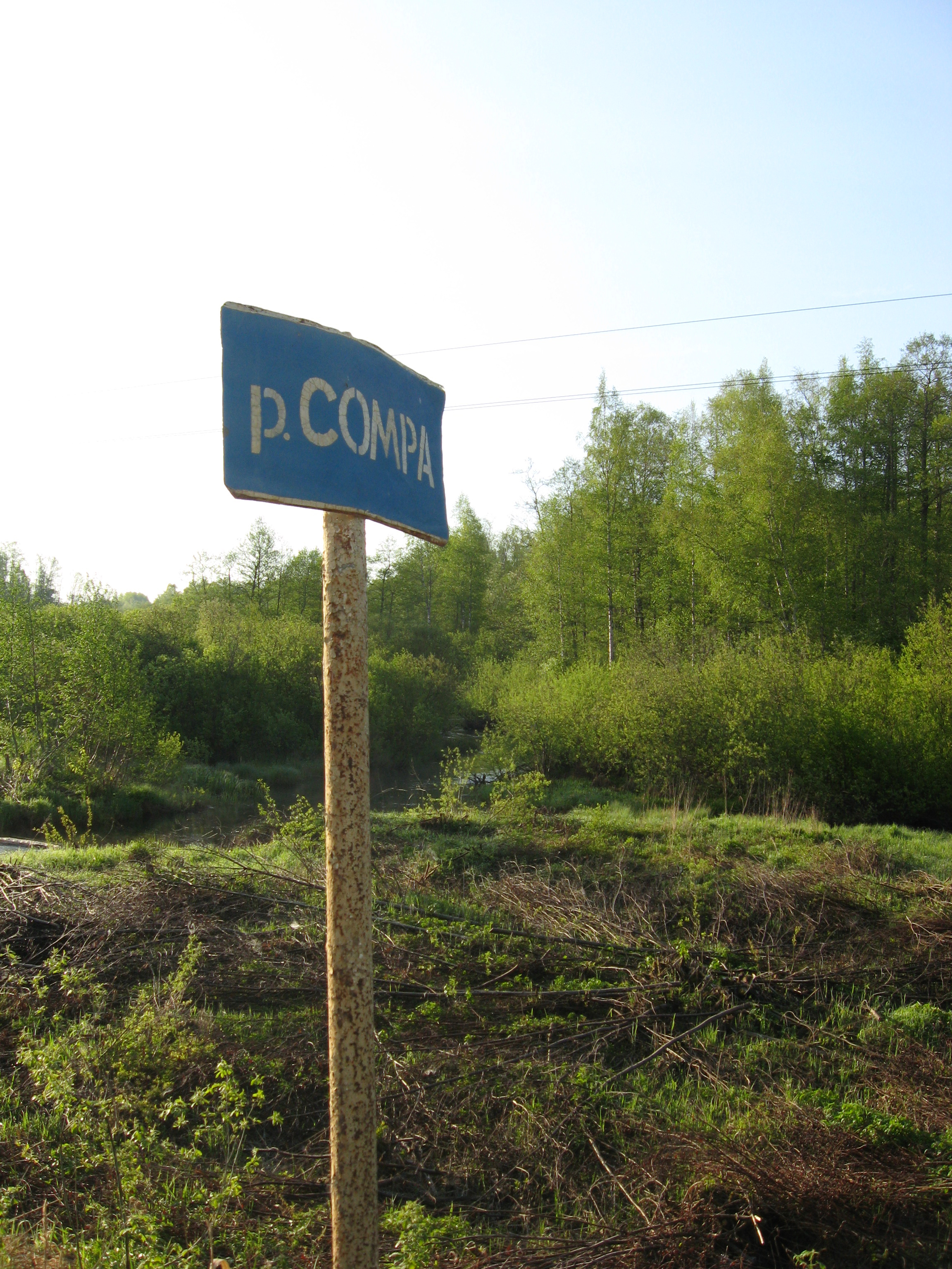 Дорожный указатель реки Самры по дороге Р42.